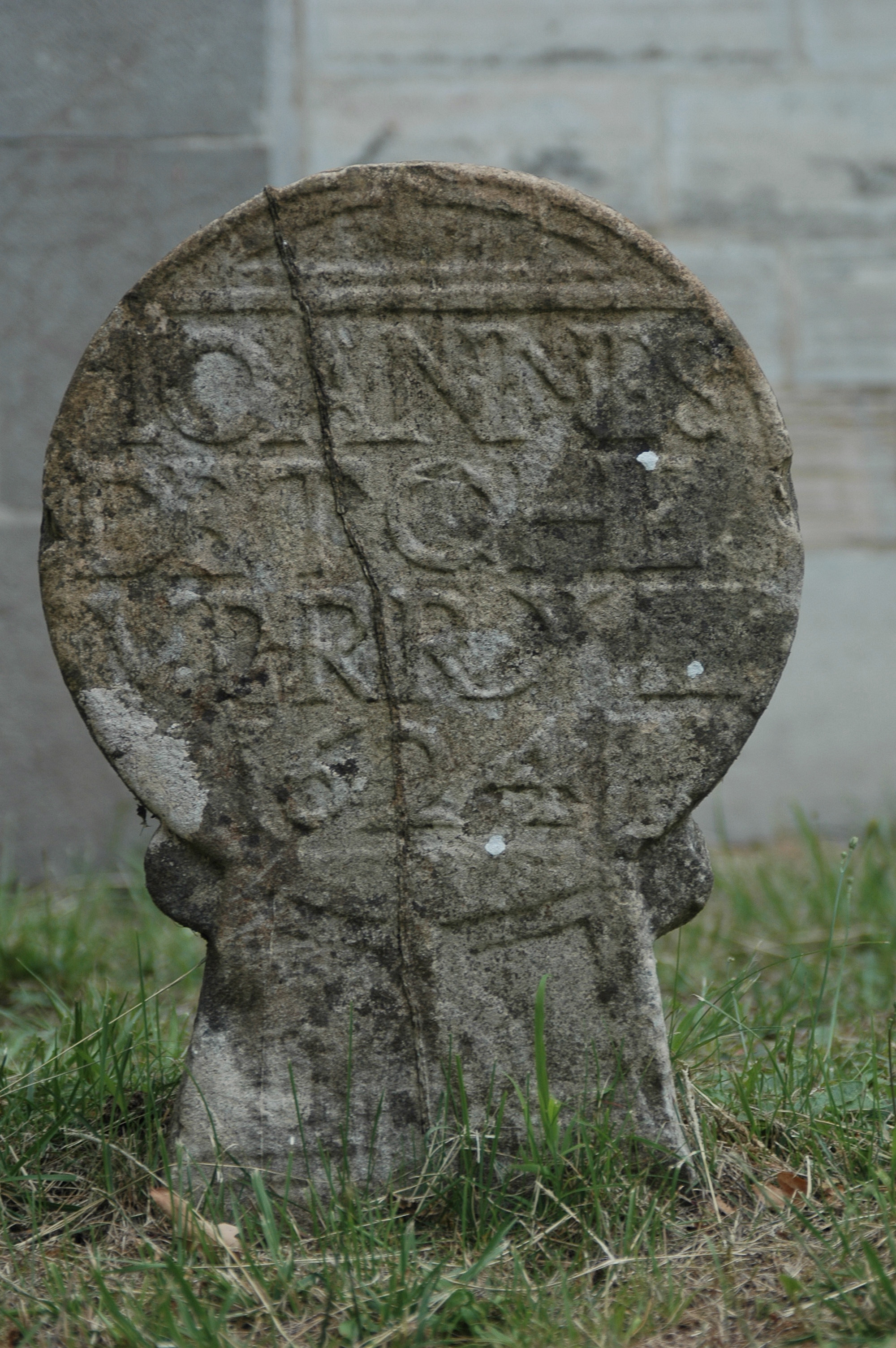 Larressore, stèle discoïdale. Photo prise le 08/08/06 par Harrieta171